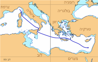 אוניית המעפילים דב הוז - מסלול